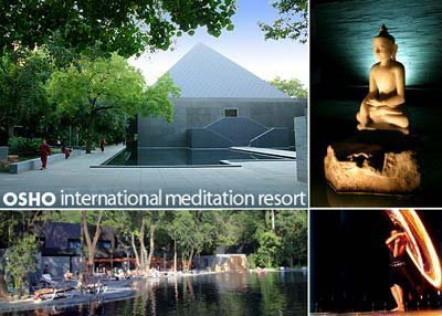 OIMR picture